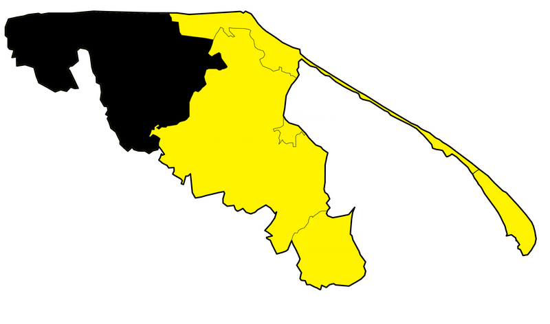 administrative division of Puck County (pl: powiat pucki) - gmina Krokowa Author: Krzysztof